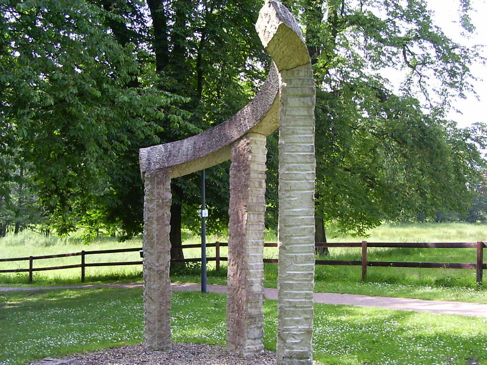 Monument beim Kloster Loccum. Die andere Hälfte des Kunstwerks befindet sich beim Partnerkloster in Thueringen.